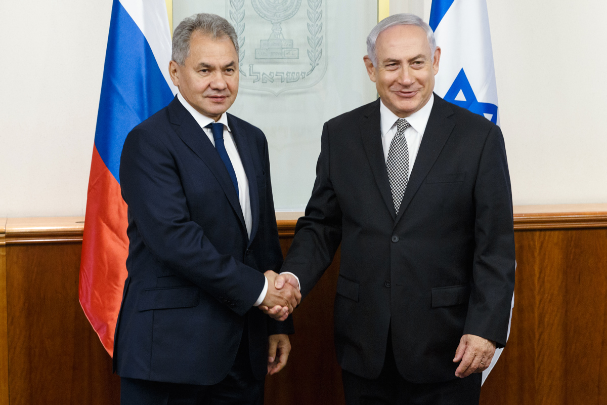 Встреча Министра обороны России генерала армии Сергея Шойгу с премьер-министром Израиля Биньямином Нетаньяху в Иерусалиме